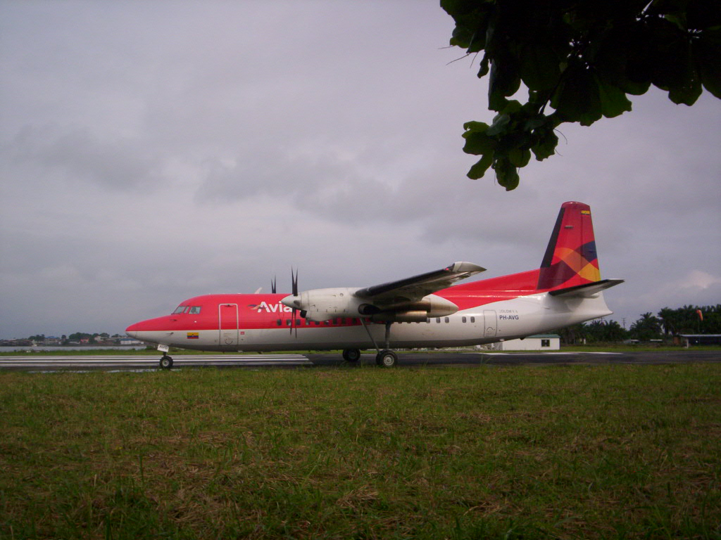 Fokker F50 en el aeropuerto La Florida